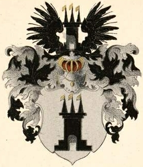 Wenge gen. Lambsdorffi suguvõsa aadlivapp